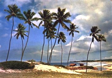 Praia de Itapuan, Salvador, Bahia, Brasil